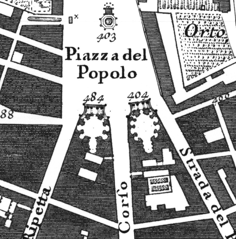 Pianta di Nolli